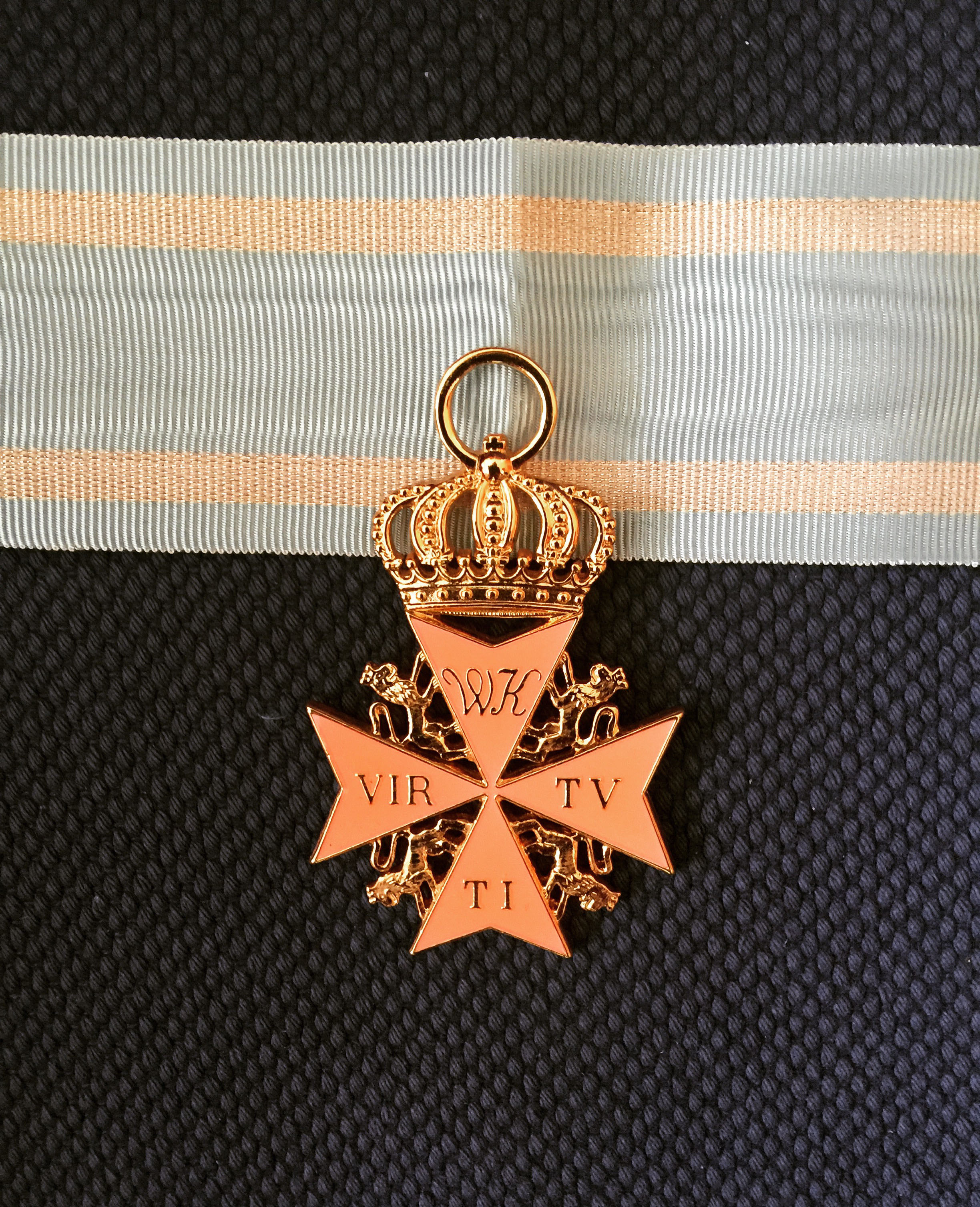 Landgrafschaft Hessen - Kassel